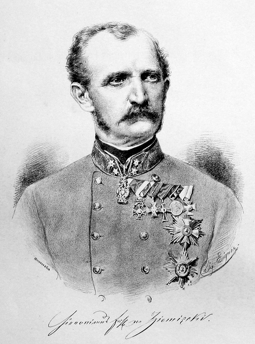 Hieronymus Anton von Ziemiecki von Ziemiecin (1817-1906), nassauischer und österreichischer General